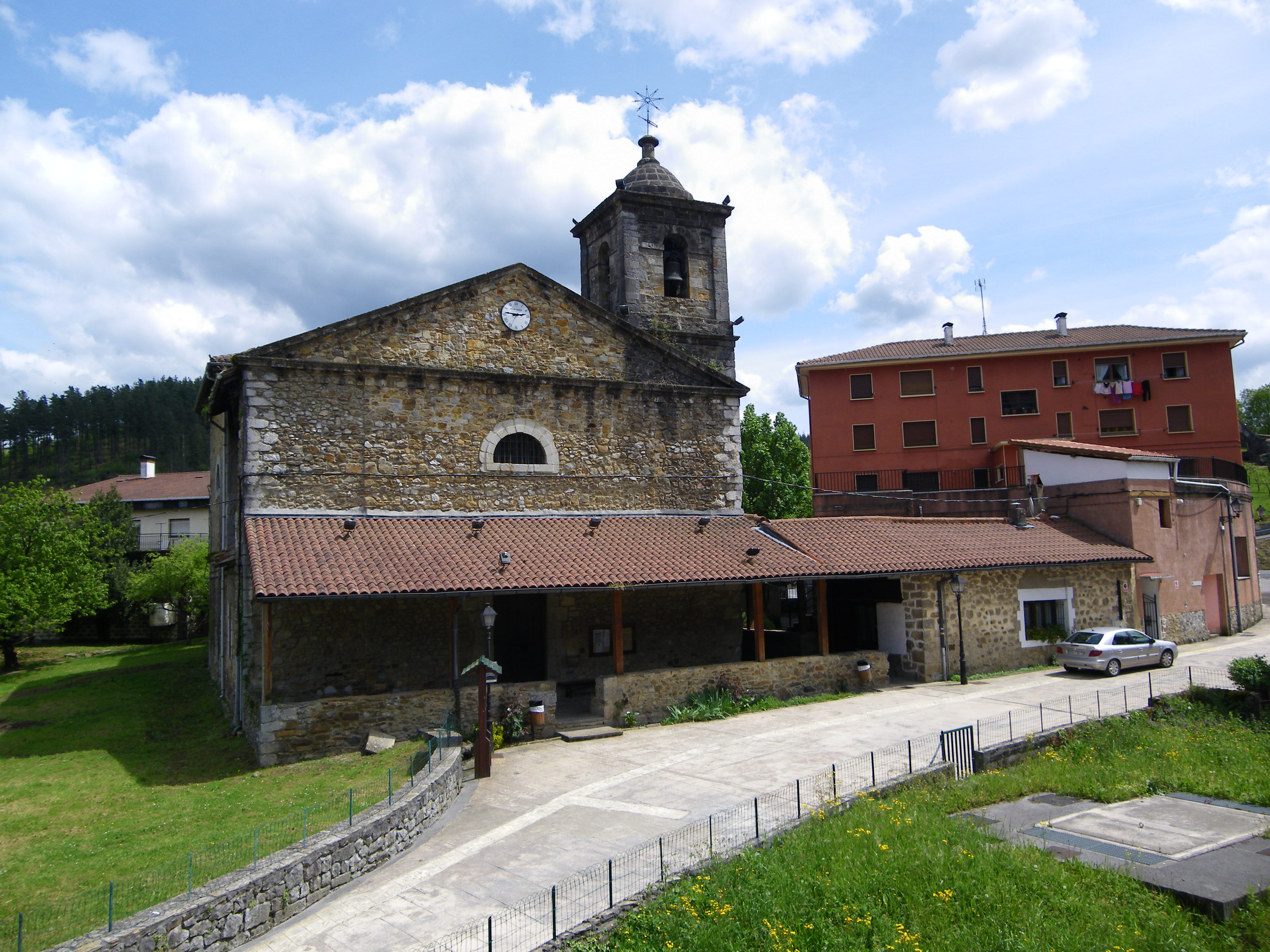 San Pedro Apostoluaren eliza, Vidaurre arkitektoak 1826an berreraiki zuen. Arantzazu, Arratia, Bizkaia, Euskal Herria.